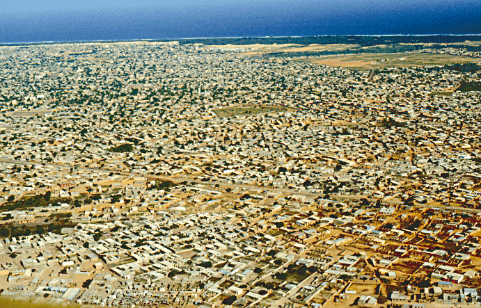 Vue aérienne de Pikine (Sénégal)